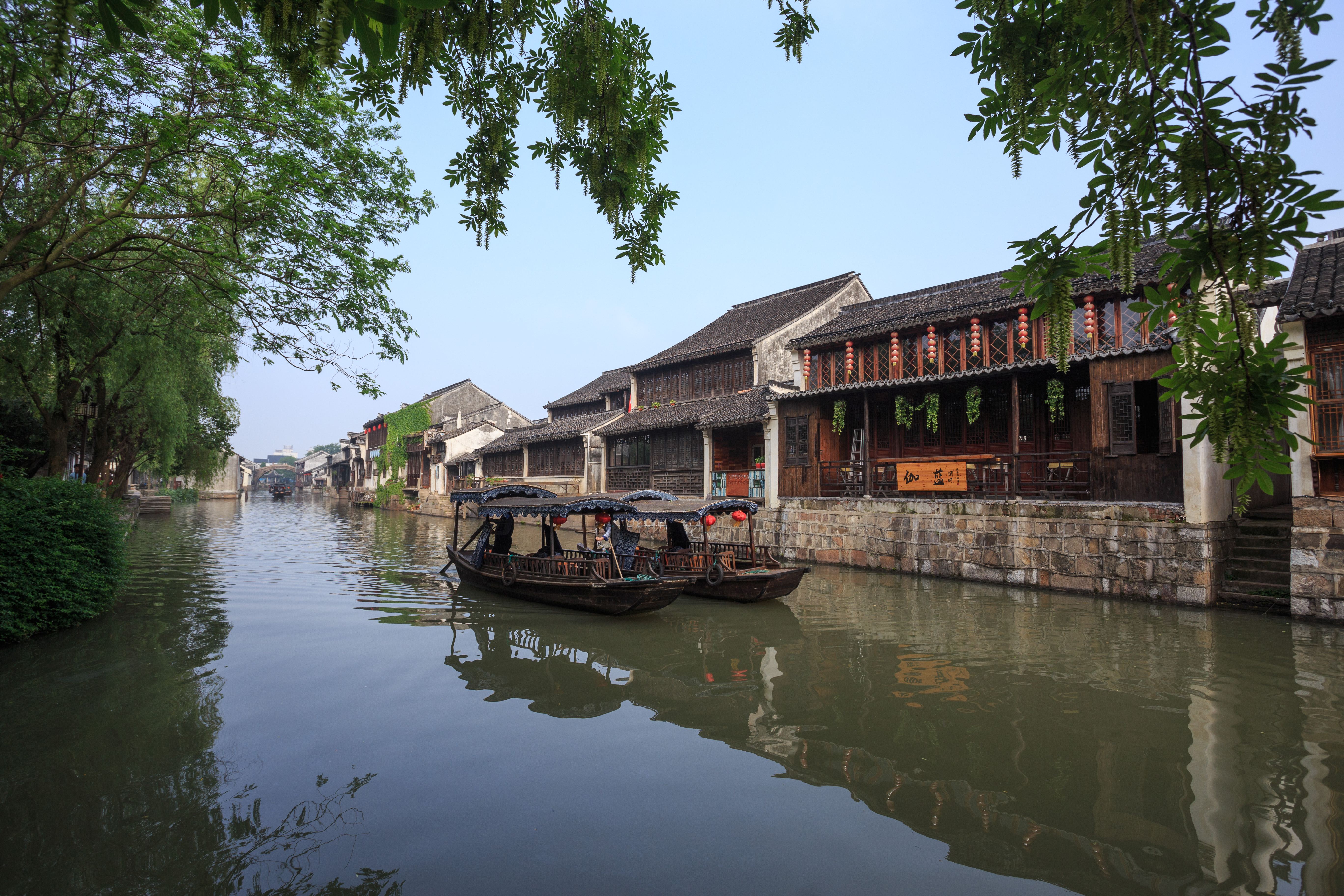 湖州南浔